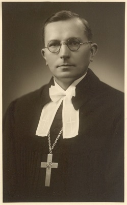 Karl Koppel